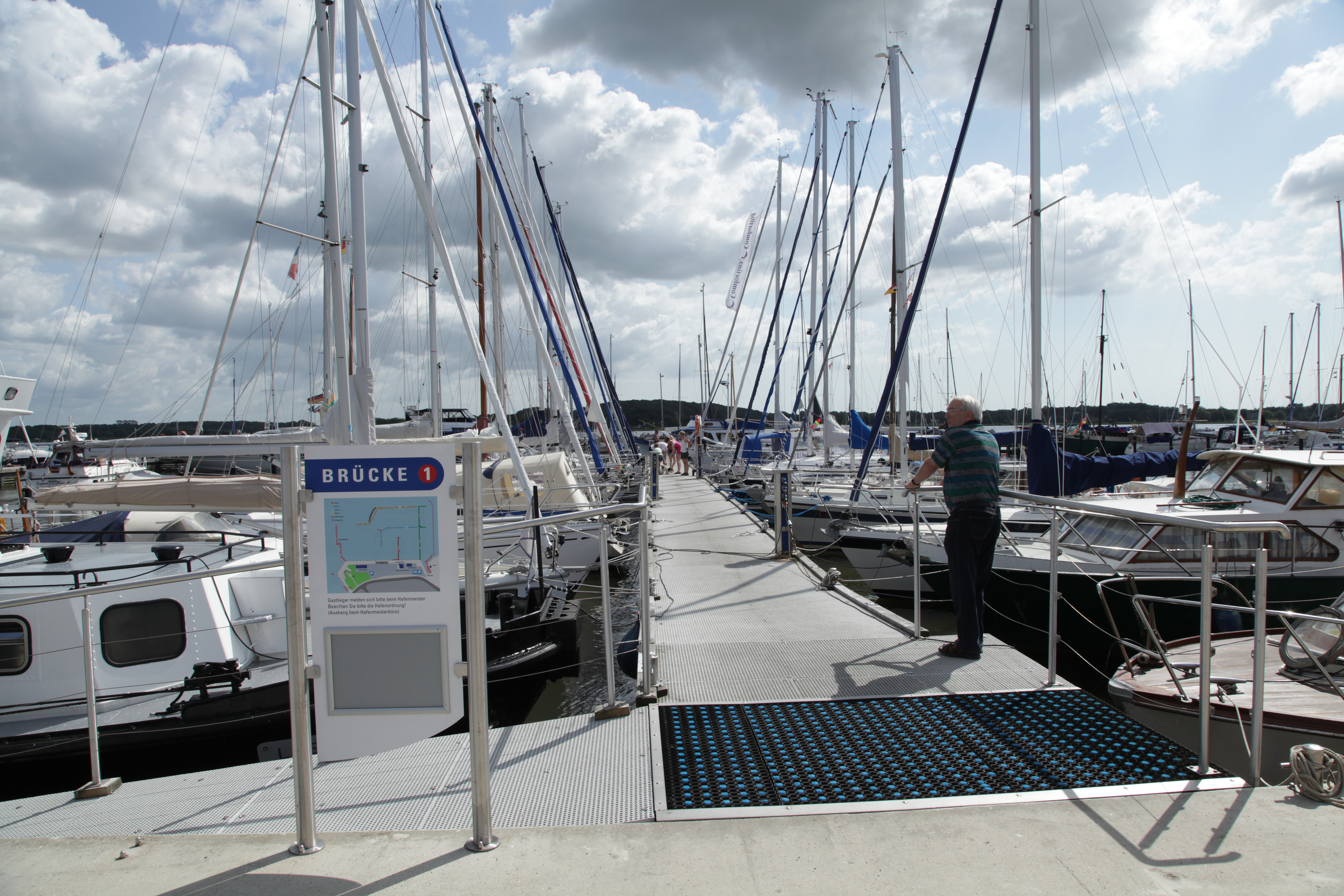 Stadthafen, Am Hafen in Schleswig